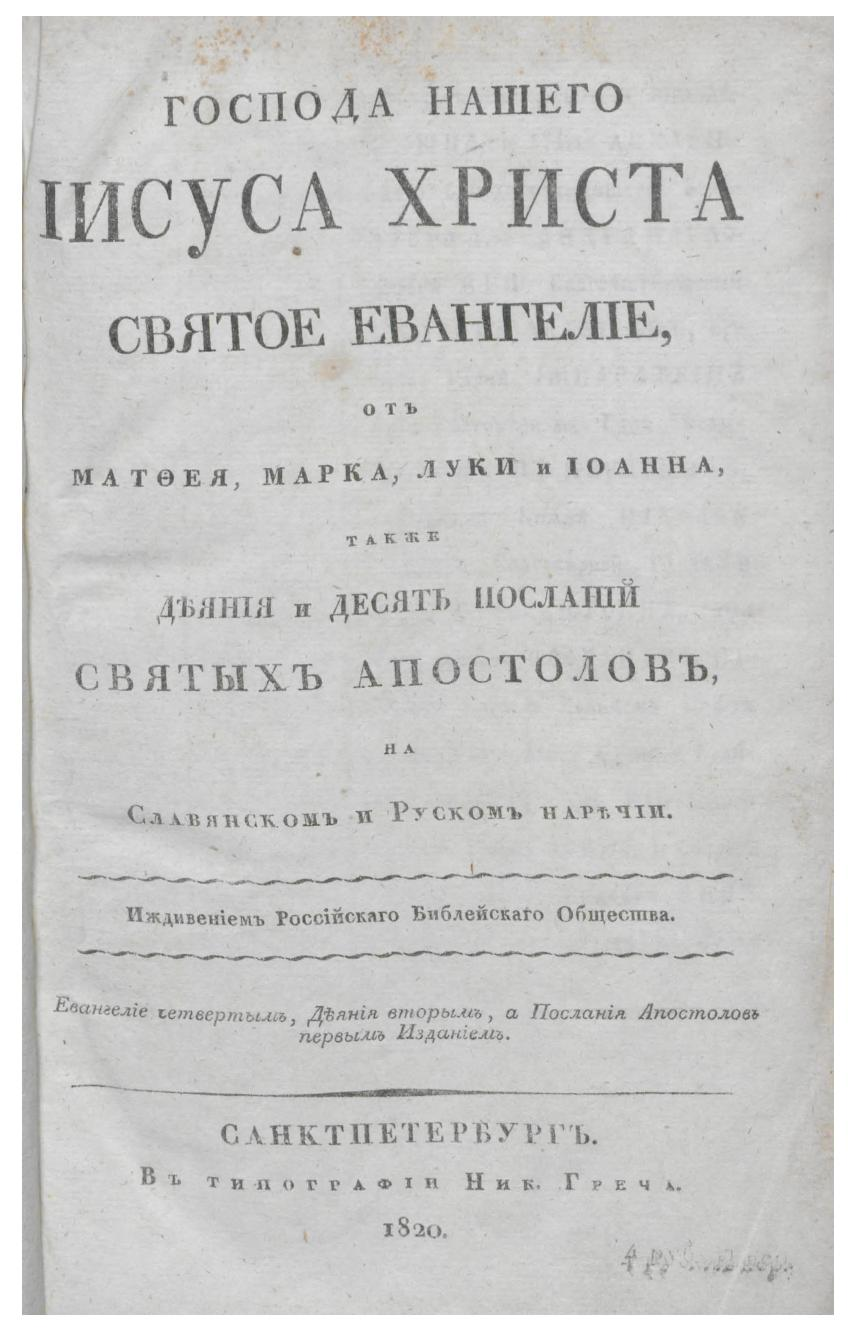 Синодальный перевод: Евангелие, от Матфея, Марка, Луки и Иоанна, также Деяния и Десять посланий святых апостолов, : На славянском и руском наречии. 1820 год.